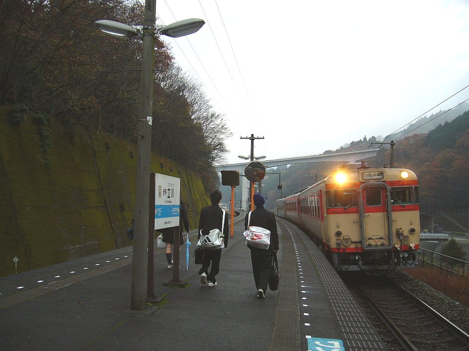 予讃線伊予立川駅 国鉄色キハ65+国鉄色キハ58+キハ32が進入